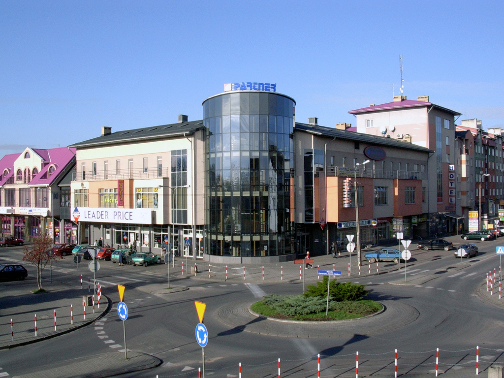 Mińsk Mazowiecki (rond)